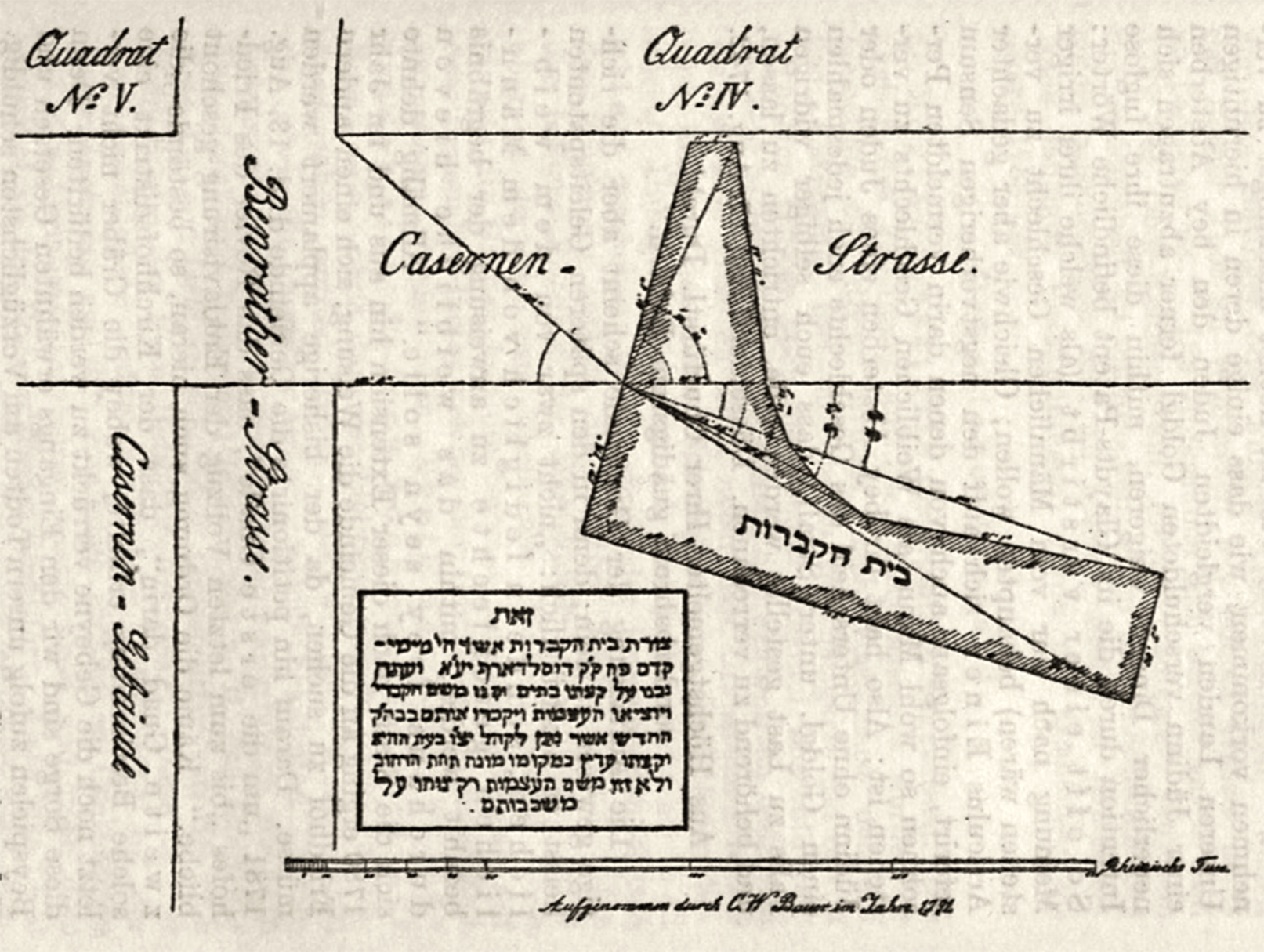 Jüdischer Friedhof Kasernenstraße Düsseldorf beschreibt Rabbiner Dr. Abraham Wedell: „Der älteste Friedhof der Düsseldorfer Gemeinde war ihr von dem Landesherren auf der jetzigen Kasernenstraße gleich nach ihrer Ansiedlung angewiesen worden. Die beeindruckende Zeichnung stellt den Situationsplan desselben dar.“ Zeichnung Situationsplan (Aufgenommen durch C. W. Bauer im Jahre 1792): Lage der Alten Synagoge im Quadrat Nr. IV nach der Ostseite in hiesiger Carlstadt (Kasernenstraße 17–19); Lage des jüdischen Friedhofs in Höhe der heutigen Kasernenstraße Nr. 14